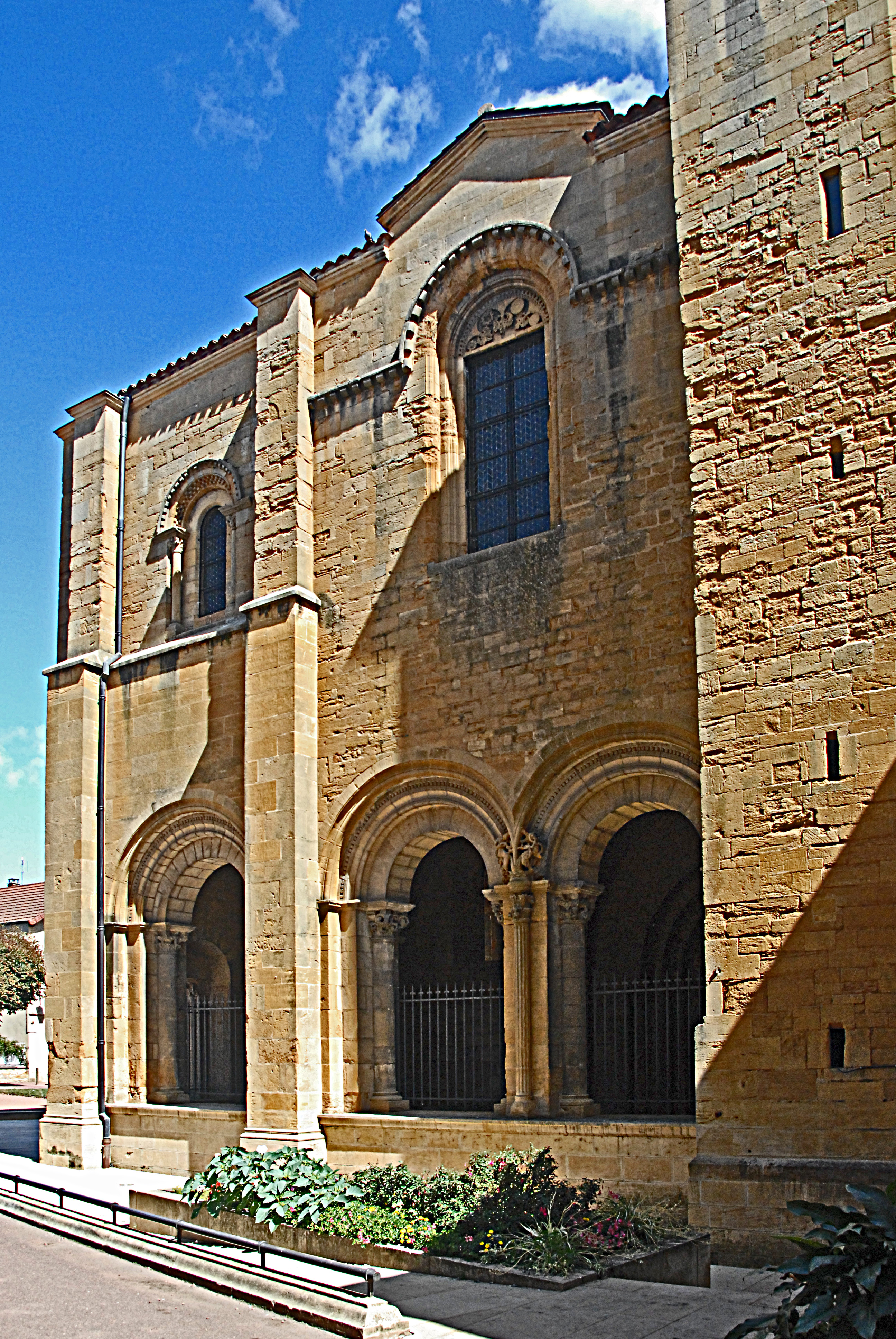 Westseire von SWBogenansätze EG